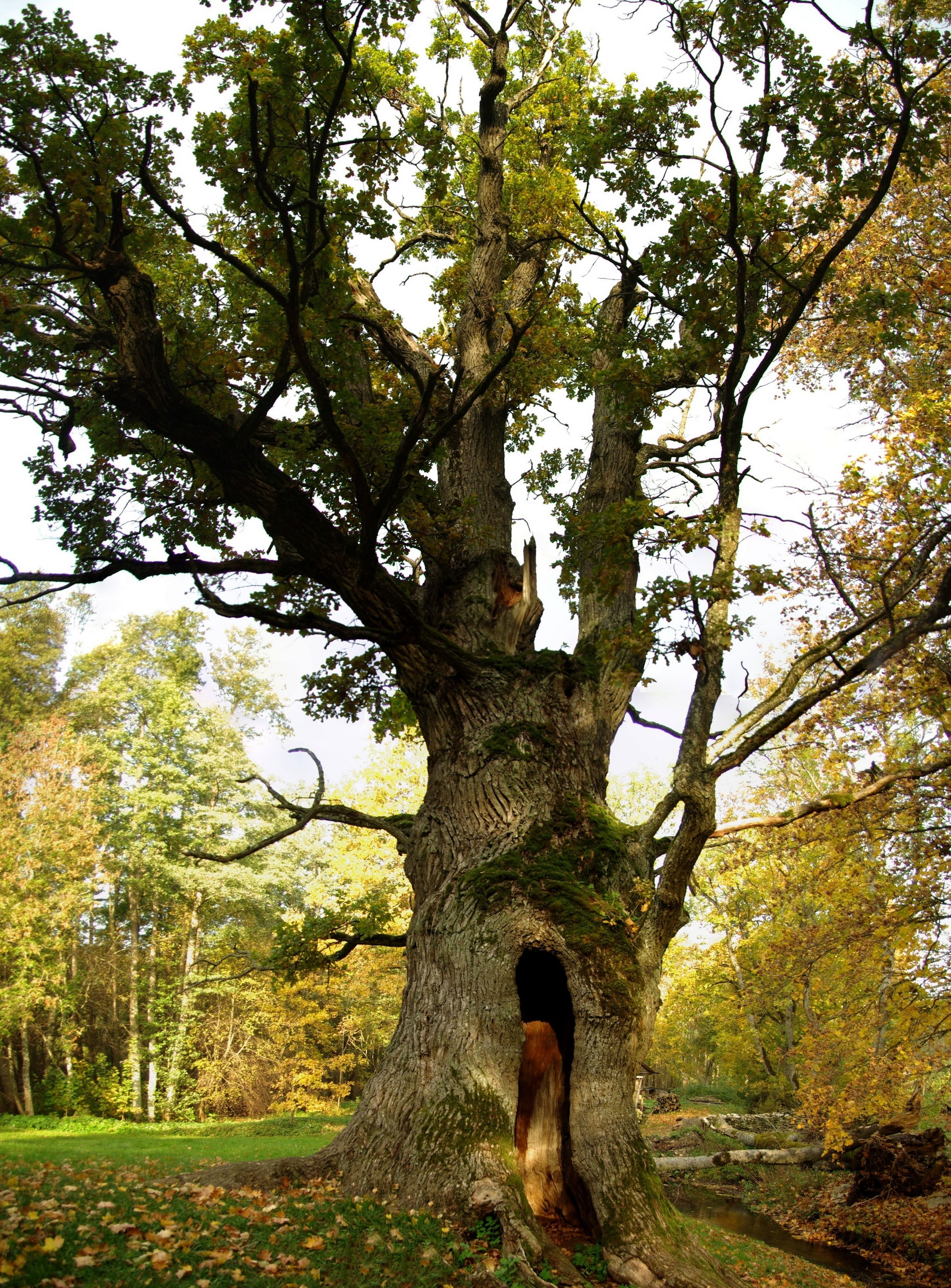 Asub Kuusalu vallas Allika külas.Põline hiiepuu